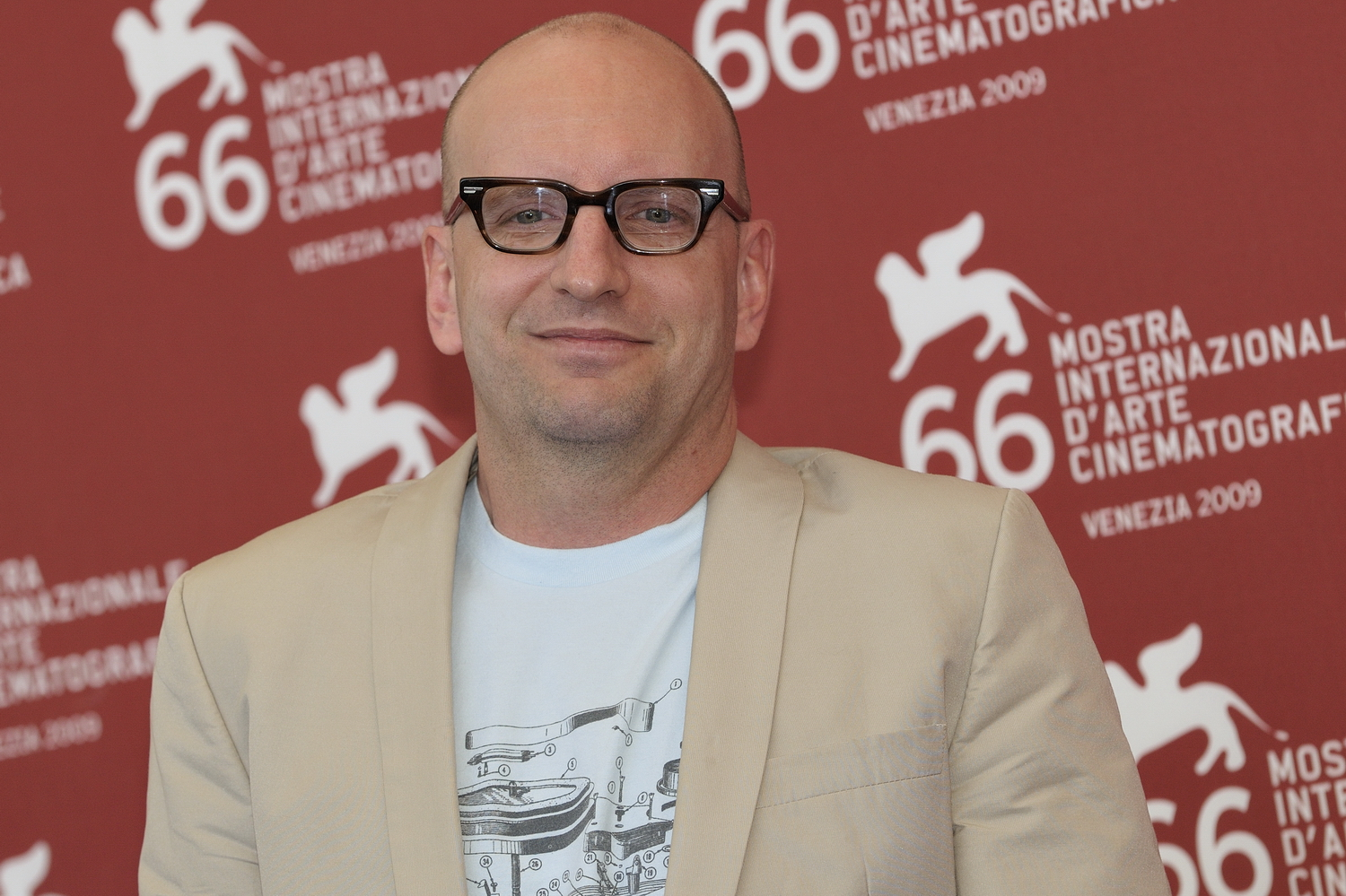 66ème Festival du Cinéma de Venise (Mostra), 6ème jour (07/09/2009) Photocall avec Steven Soderbergh pour le film : The Informant